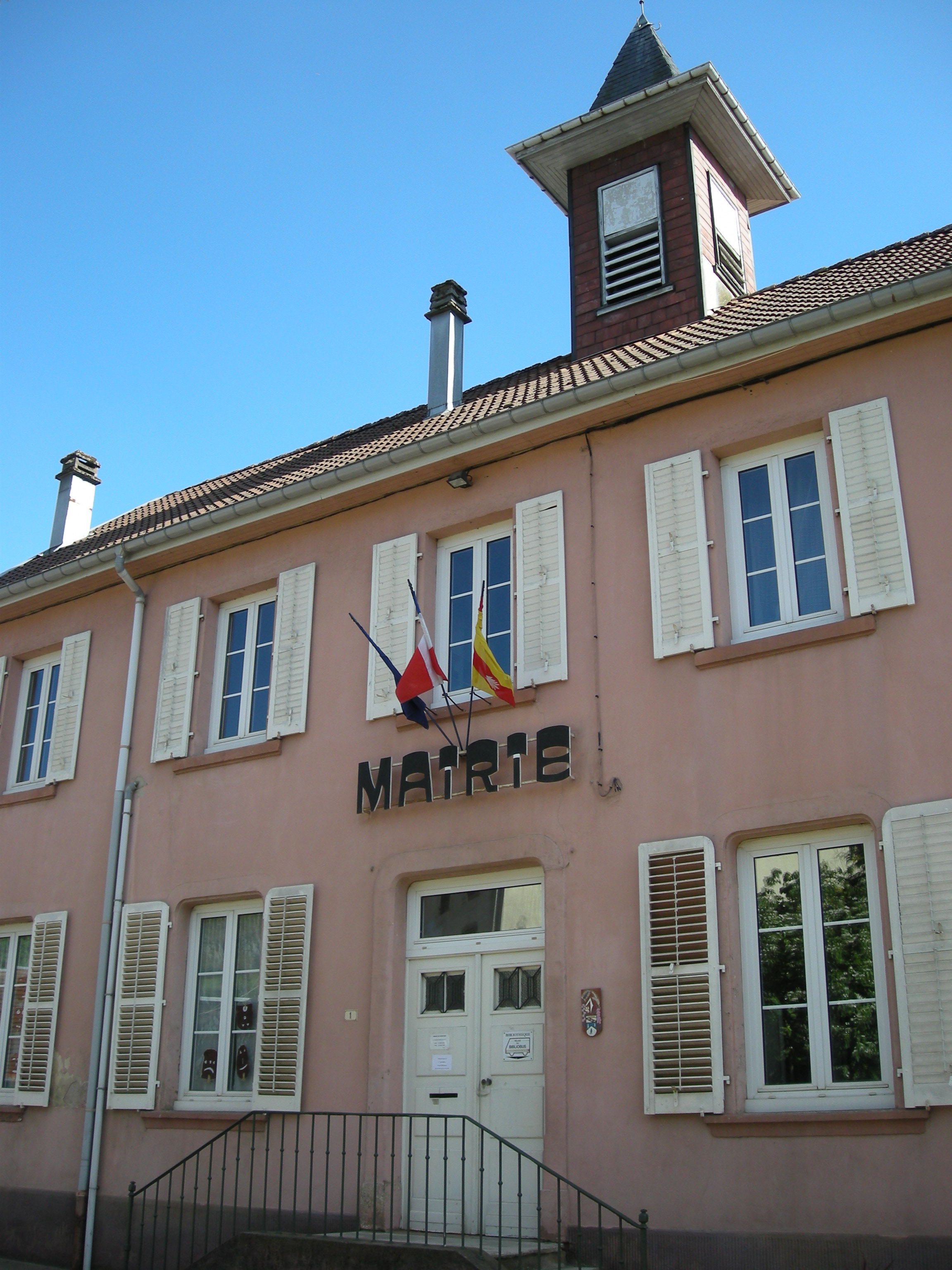 La mairie de Denipaire (Vosges)